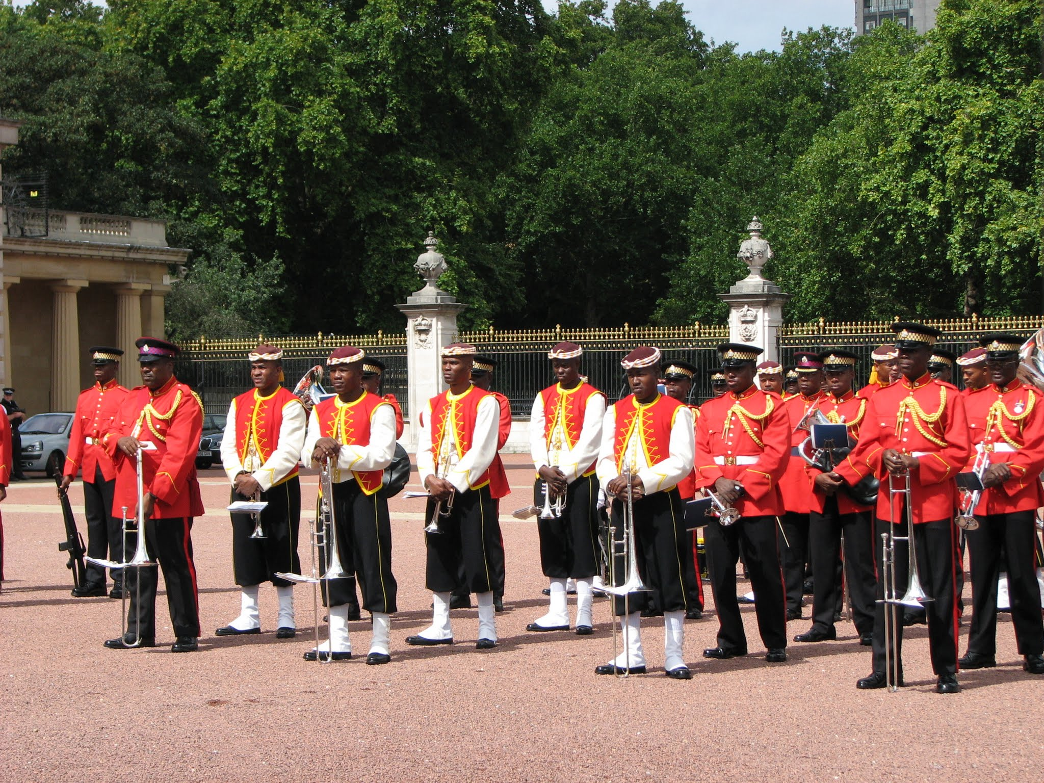 London